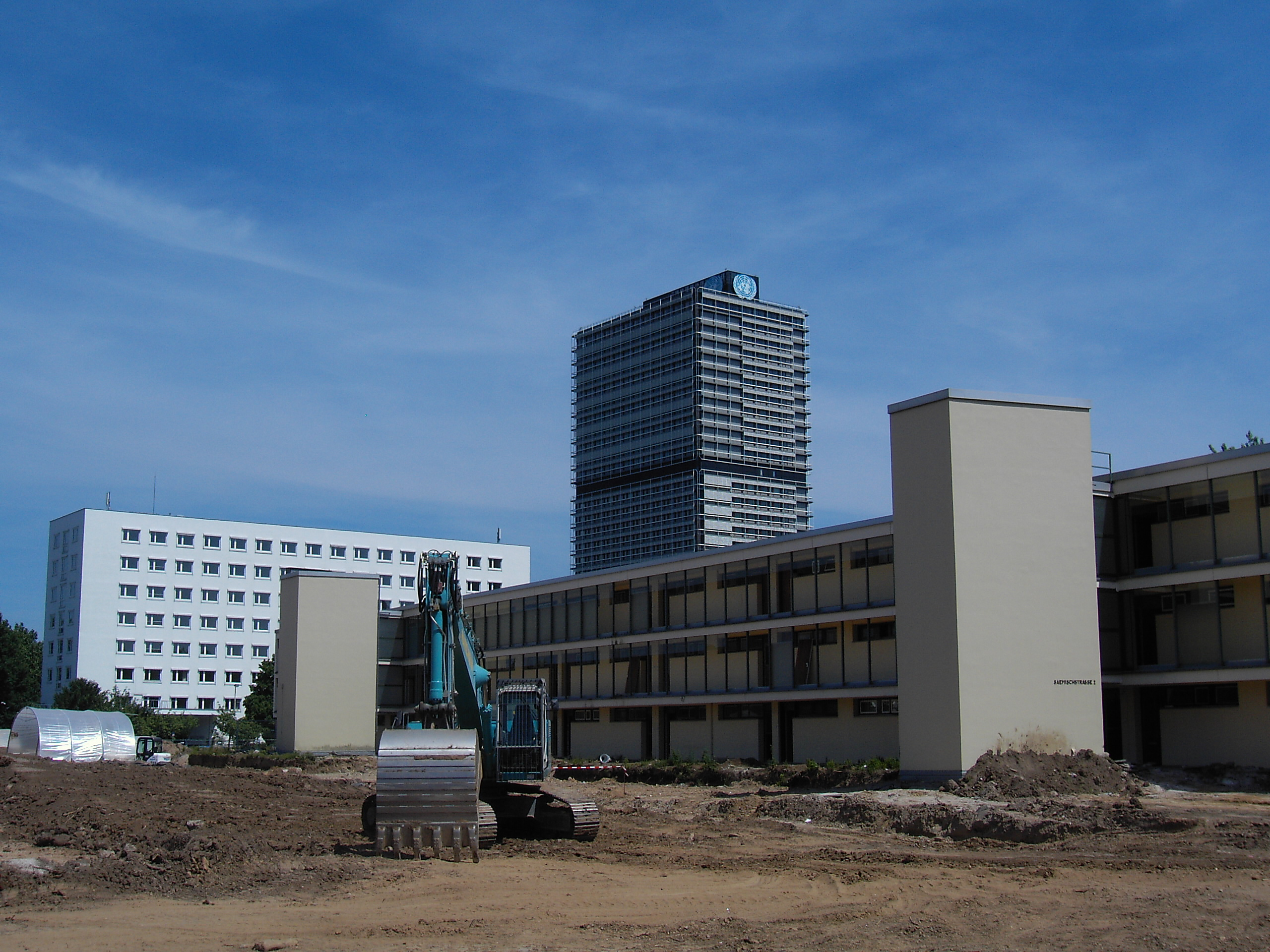 Das Gelände des künftigen World Conference Centers in Bonn mit Blick auf den Langen Eugen, der seit Juli 2006 Teil des UN-Campus ist. Das gesamte Areal mit dem UN-Campus wird nach der Fertigstellung ein neues Internationales Viertel innerhalb des Bundesviertels bilden.